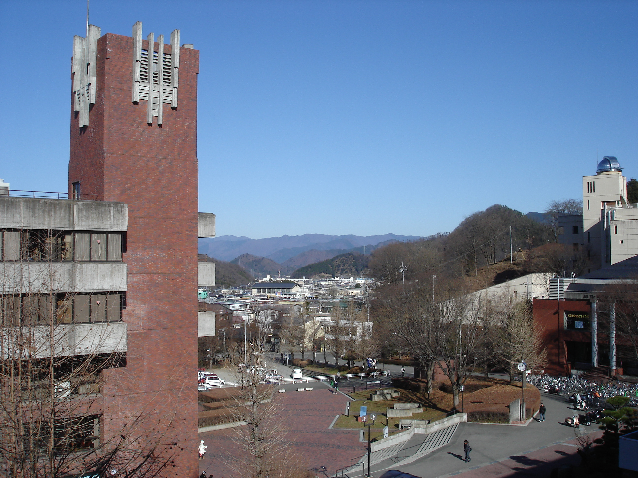 1号館から望む